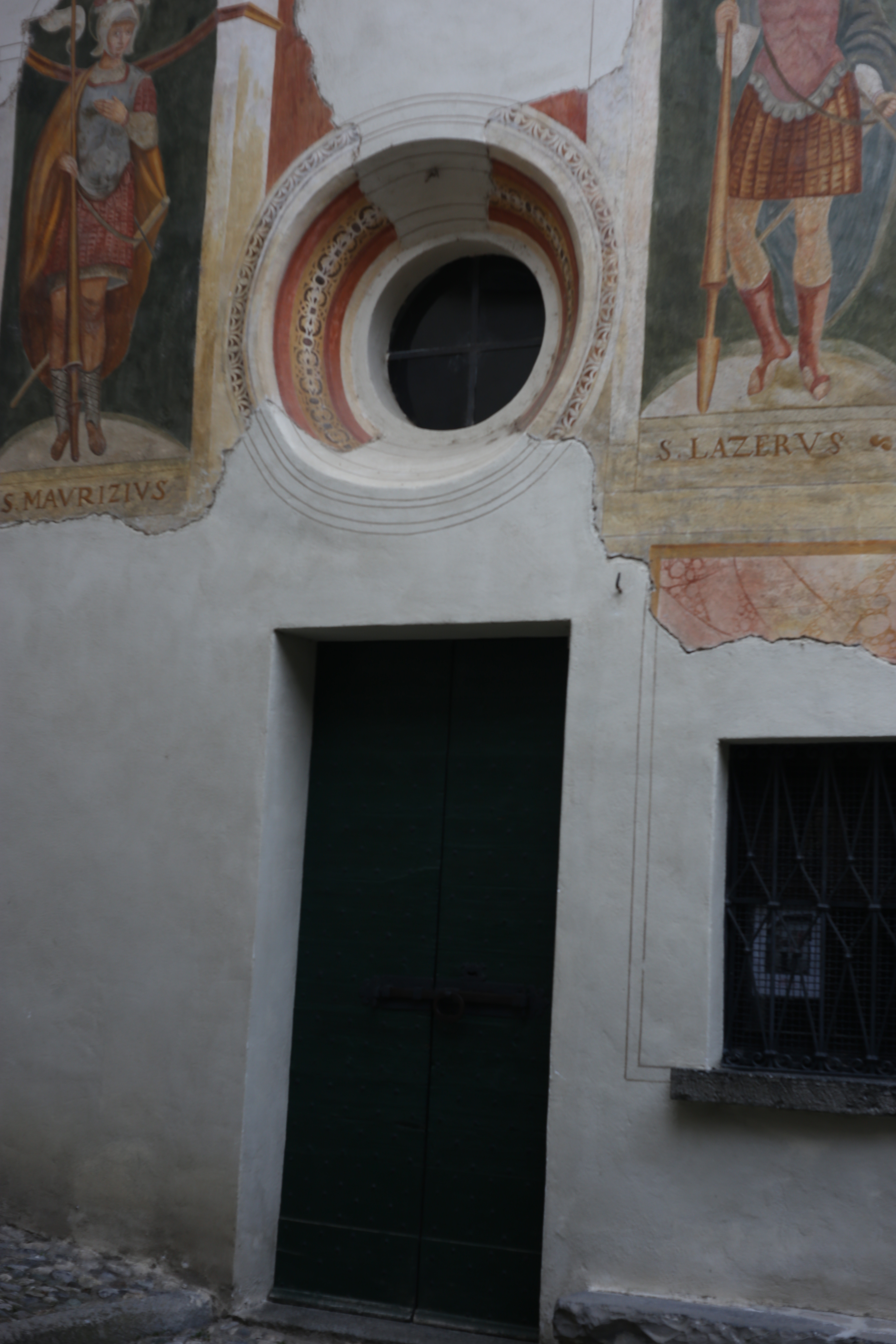 Lierna